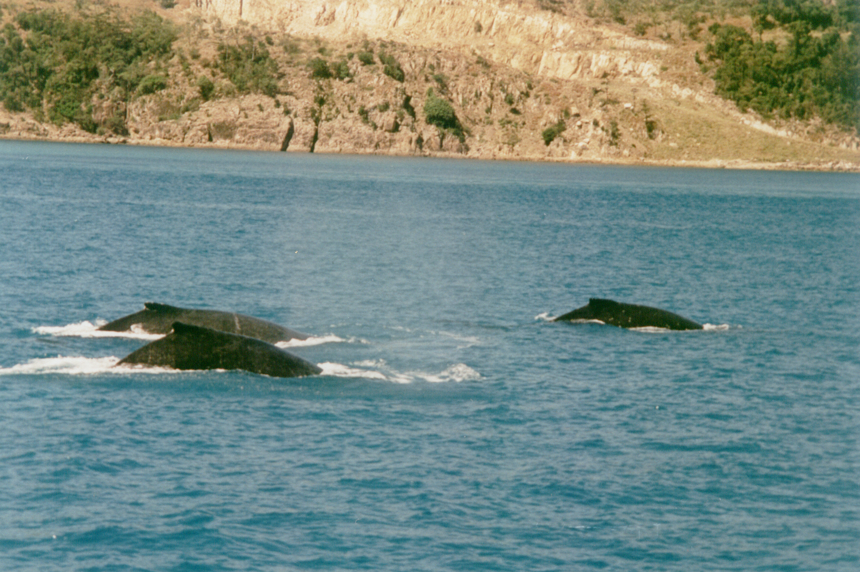 Gruppe von Buckelwalen (Megaptera novaeangliae) vor der Küste Australiens